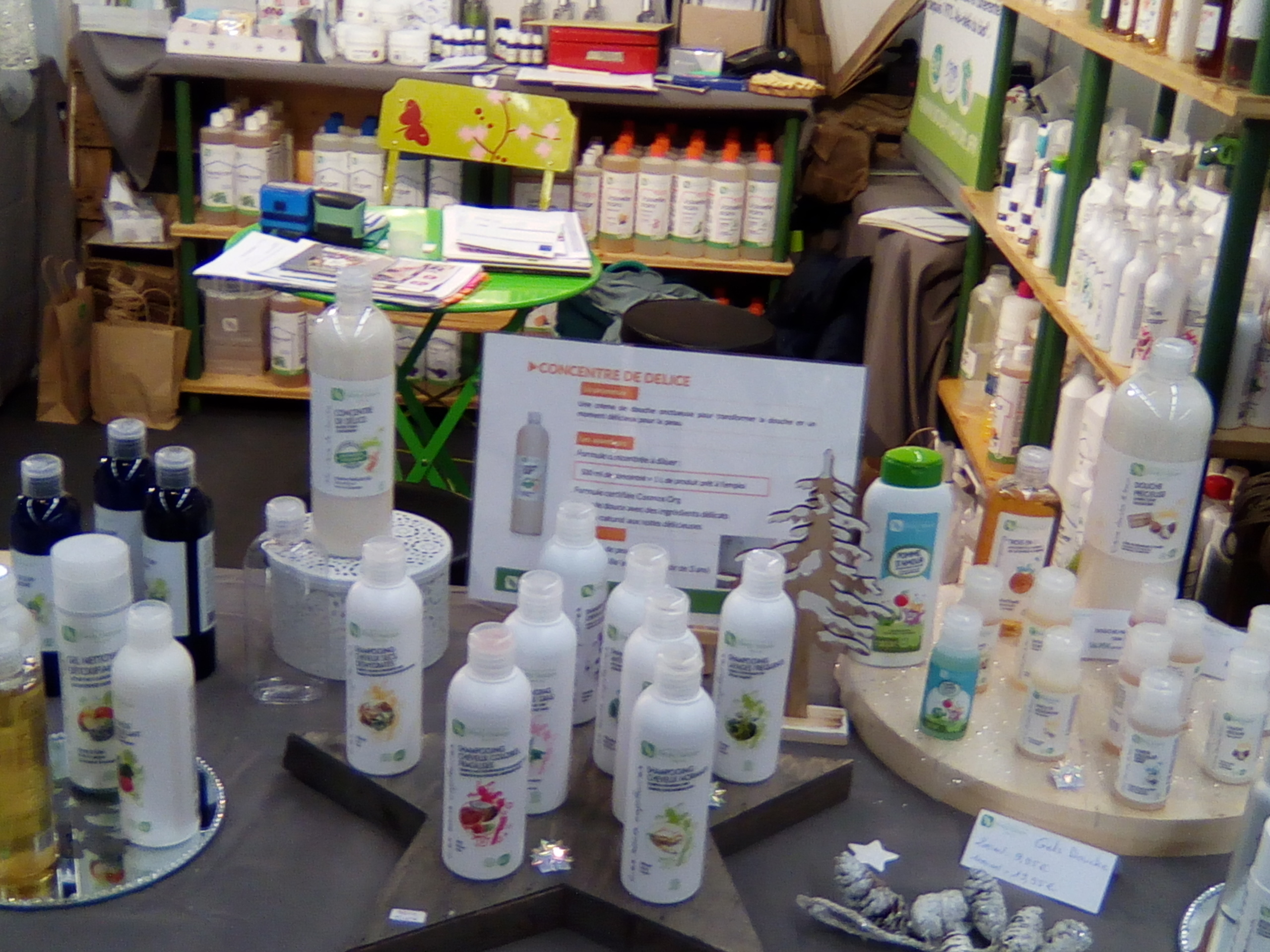 Salon Marjolaine.